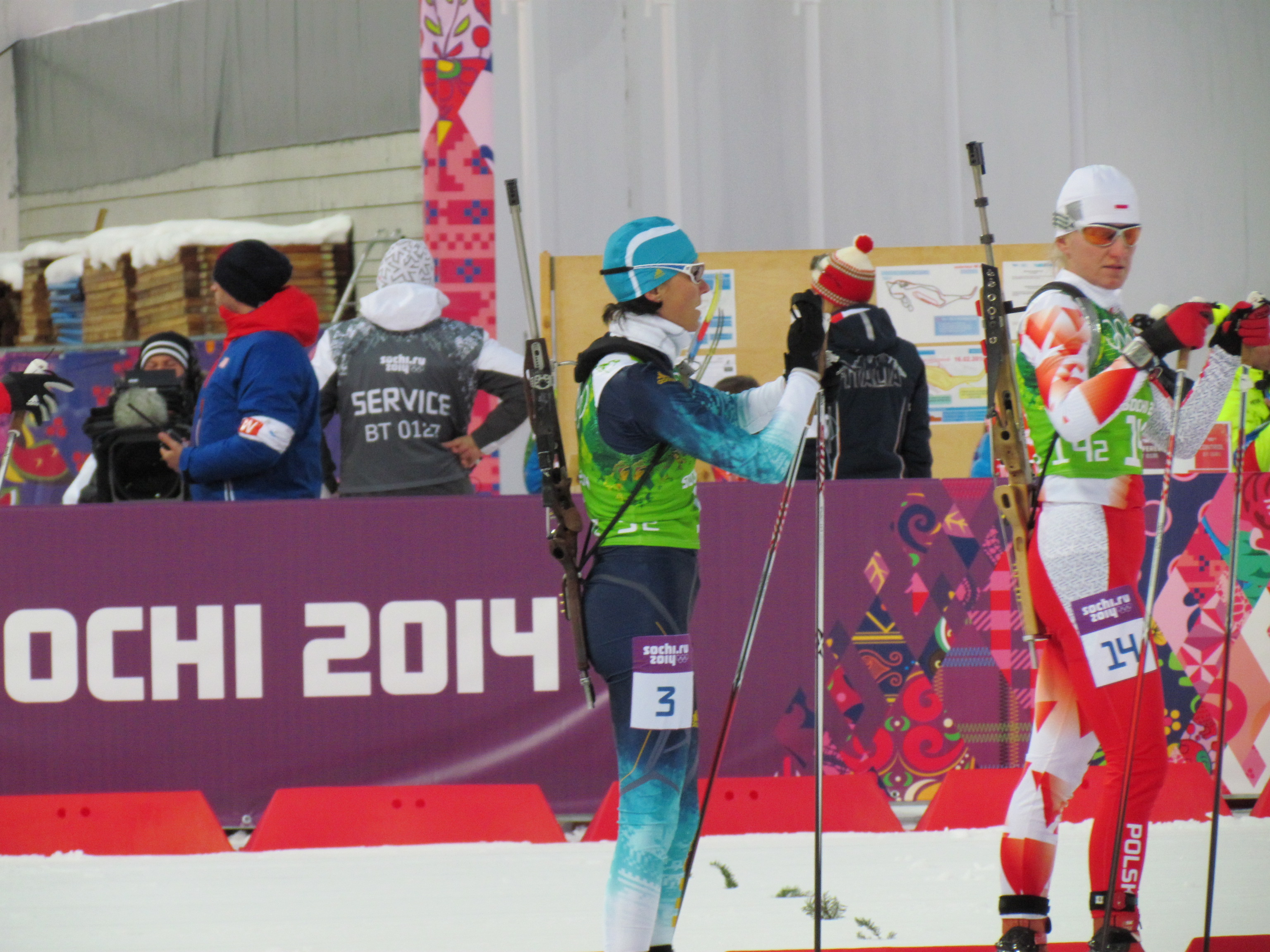 Марія Панфілова (№3-2) та Магдалена Гвіздонь (№14-2) під час змішаної естафети на Олімпіаді в Сочі